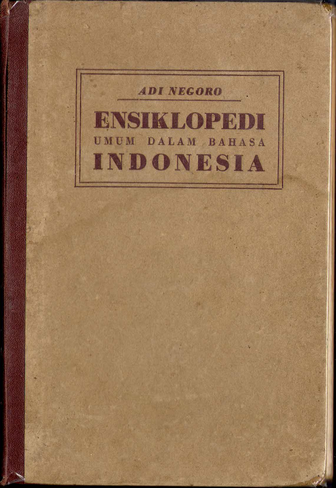 Ensiklopedi Indonesia yang diterbitkan di tahun 1953